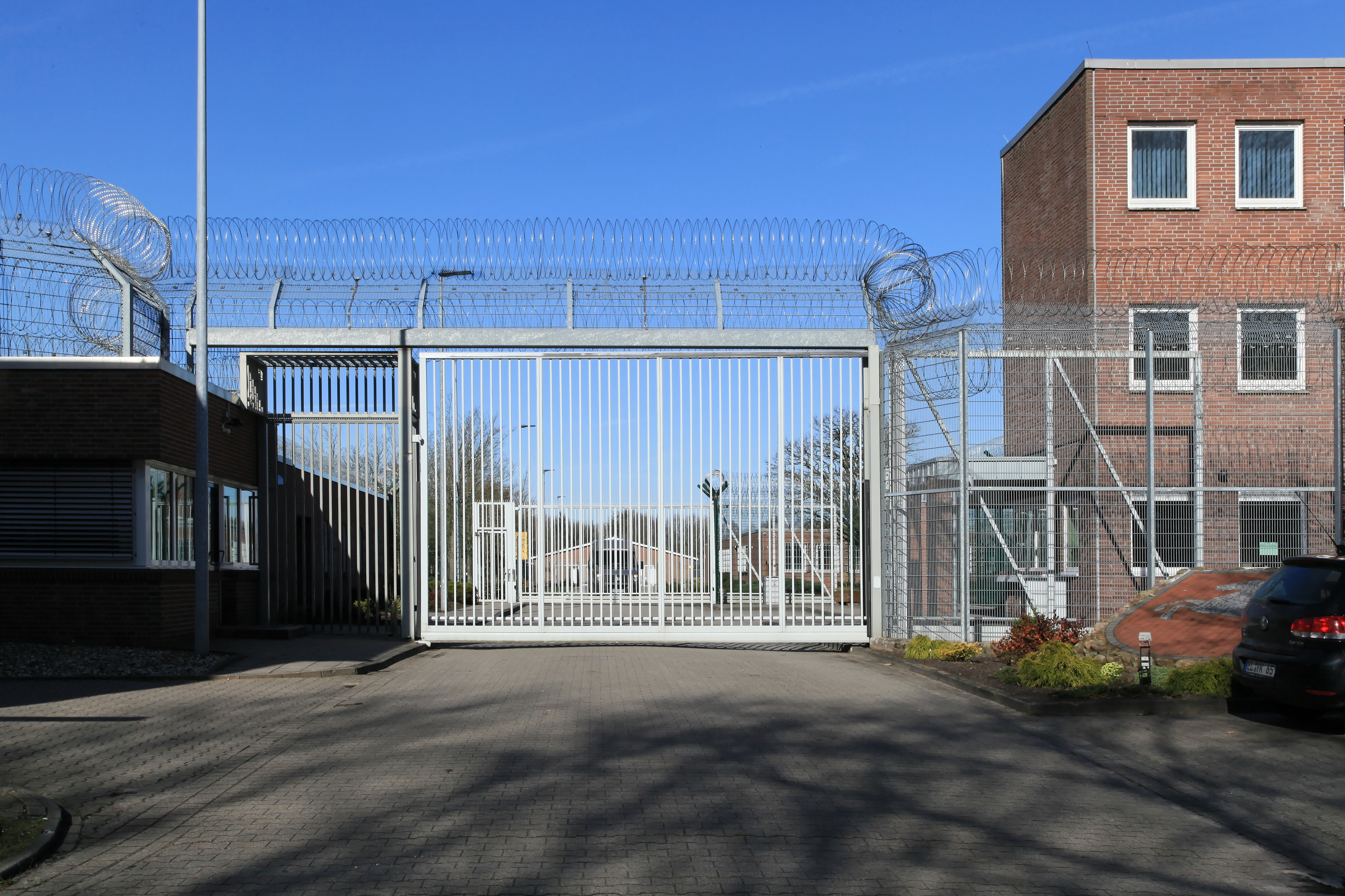 Justizvollzugsanstalt Meppen auf dem Gelände des ehemaligen Emslandlagers Versen, Grünfeldstraße in Meppen